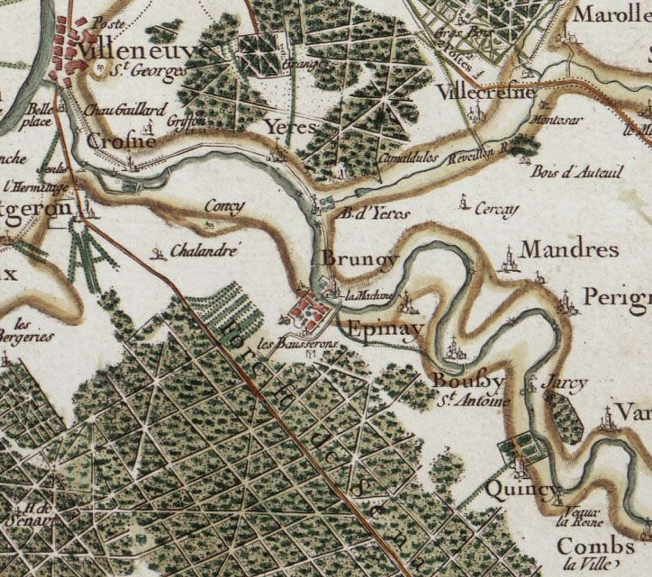 Brunoy, Essonne (France) - Carte de Cassini, vers 1780